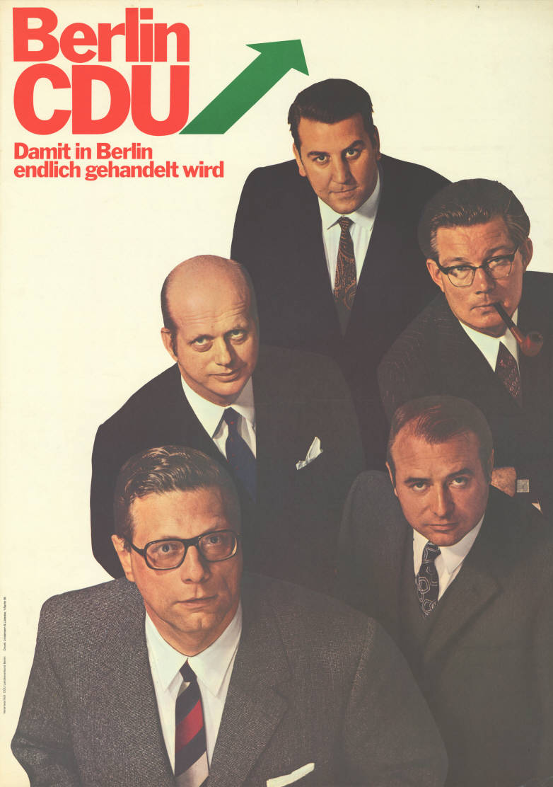 Berlin CDU Damit in Berlin endlich gehandelt wird Abbildung: Gruppenfoto Kommentar: Fotos von Karl Heinz Schmitz, Hans-Jürgen Behrendt, Ernst Benda, Heinrich Lummer, Peter Lorenz Plakatart: Kandidaten-/Personenplakat mit Porträt Auftraggeber: Verantw.: CDU Landesverband Berlin Drucker_Druckart_Druckort: Druck: Lindemann & Lüdecke, Berlin Objekt-Signatur: 10-004 : 389 Bestand: Plakate zu Abgeordnetenhauswahlen Berlin (10-004) GliederungBestand10-18: Plakate zu Abgeordnetenhauswahlen Berlin (10-004) » CDU Lizenz: KAS/ACDP 10-004 : 389 CC-BY-SA 3.0 DE